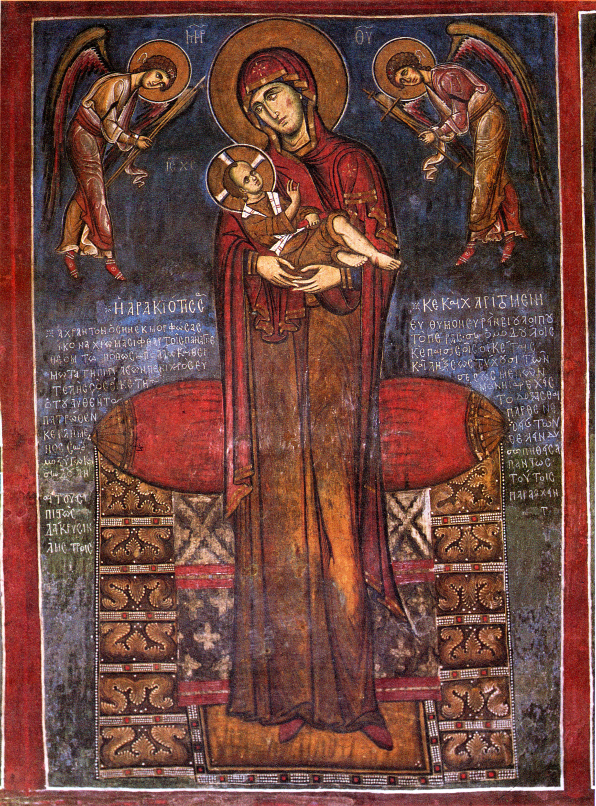 Gemälde in der Kirche Panagia tou Arakou, Lagoudera, Zypern. Typus: Maria Nikopoia- ("die Siegbringende") frontal stehend, das Kind vor ihrer Brust sitzend.